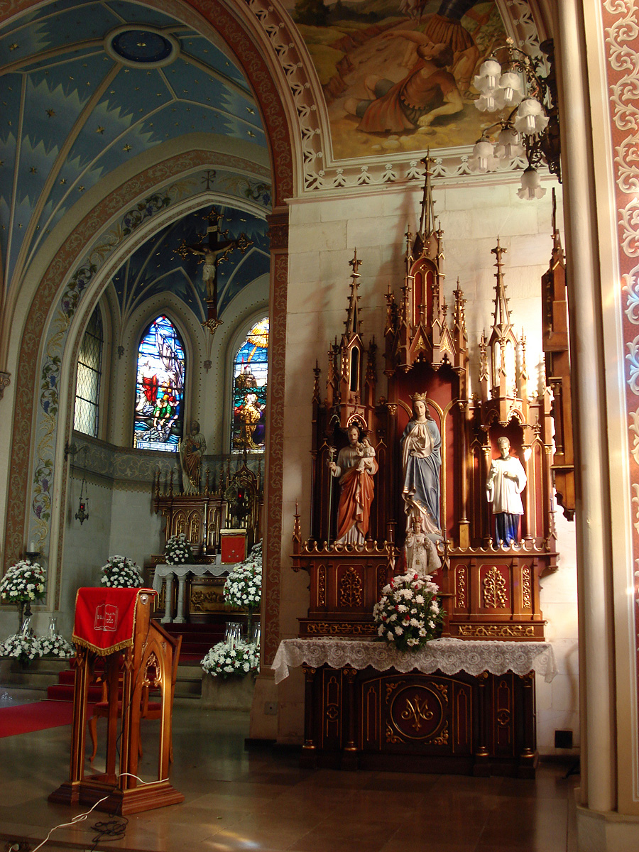 Interior da Igreja de São pedro, Porto Alegre, Brasil. Altar lateral e parte da capela-mor